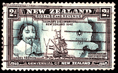 Голландский мореплаватель Абель Тасман